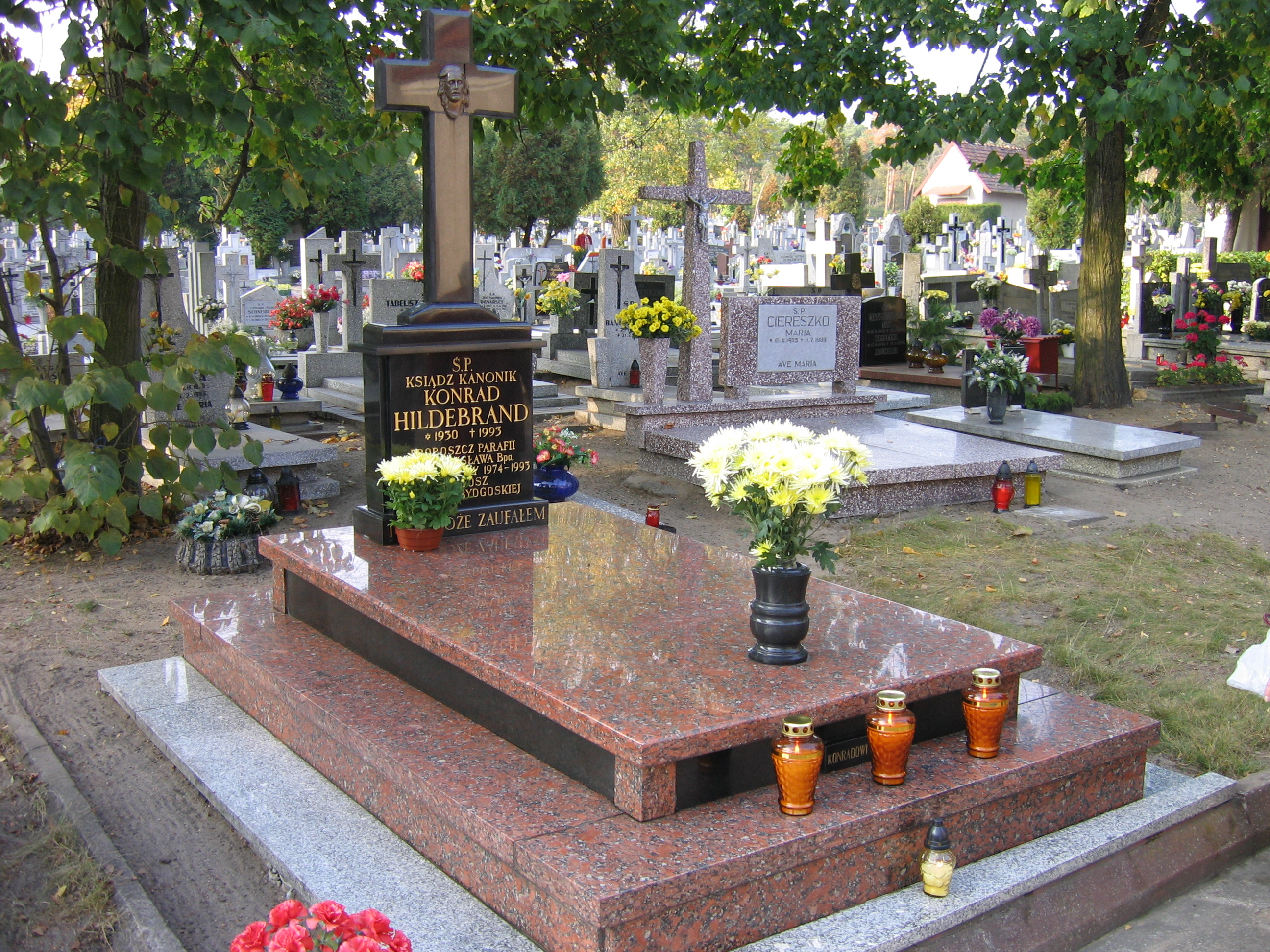 Grób ks. kanonika Konrada Hildebranda na cmentarzu parafialnym przy kościele św. Stanisława Biskupa w Bydgoszczy przy ulicy Kaplicznej 1